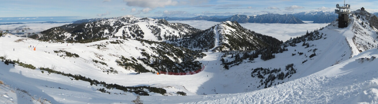 Hochkar, Panoramaview